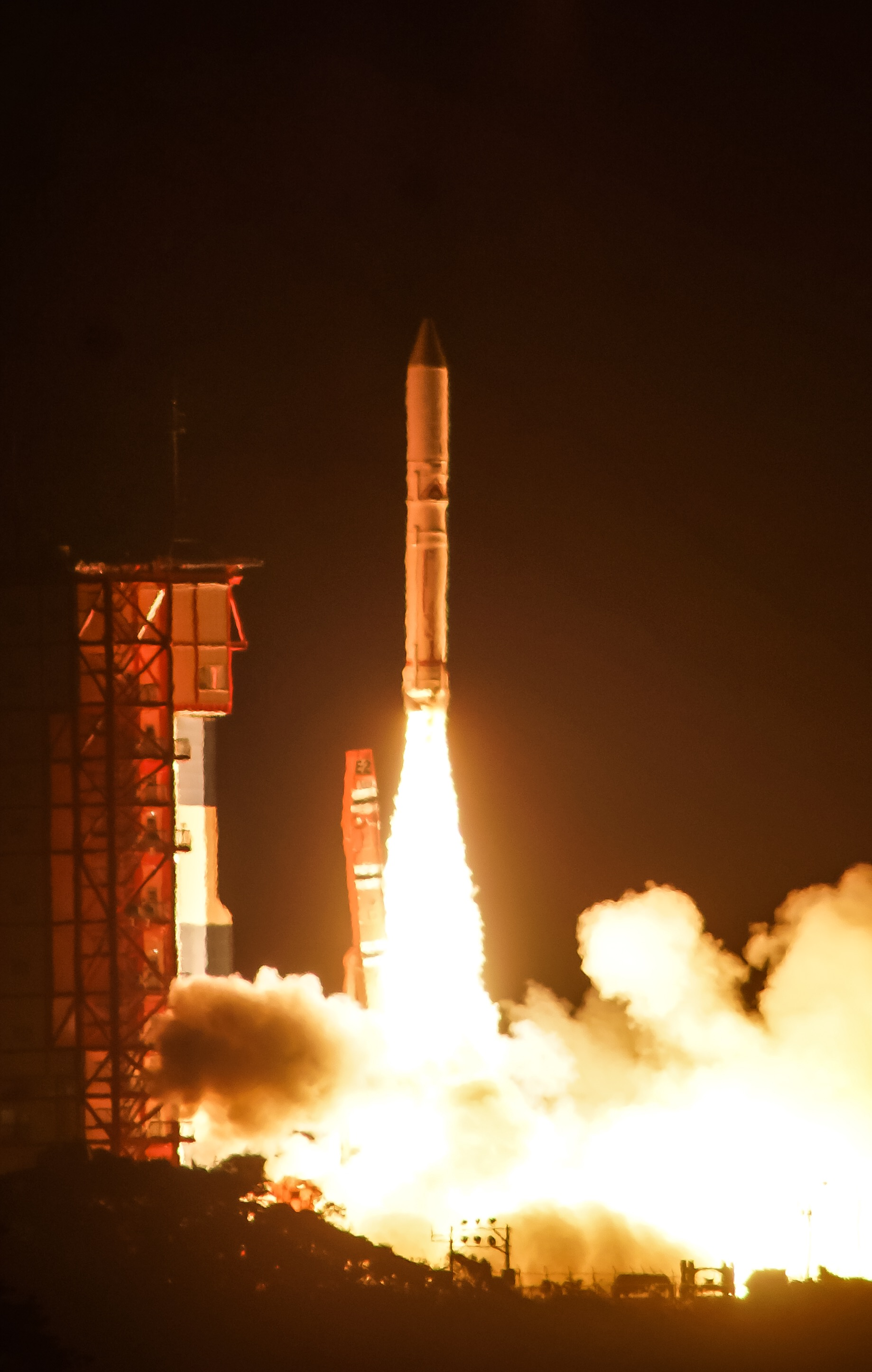 宮原ロケット見学場より